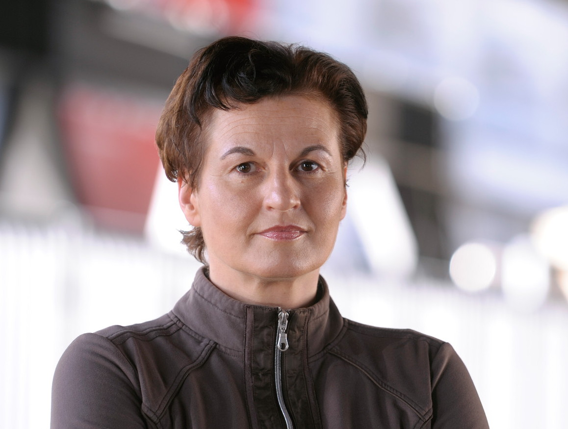 Simone Hofmann persönlich